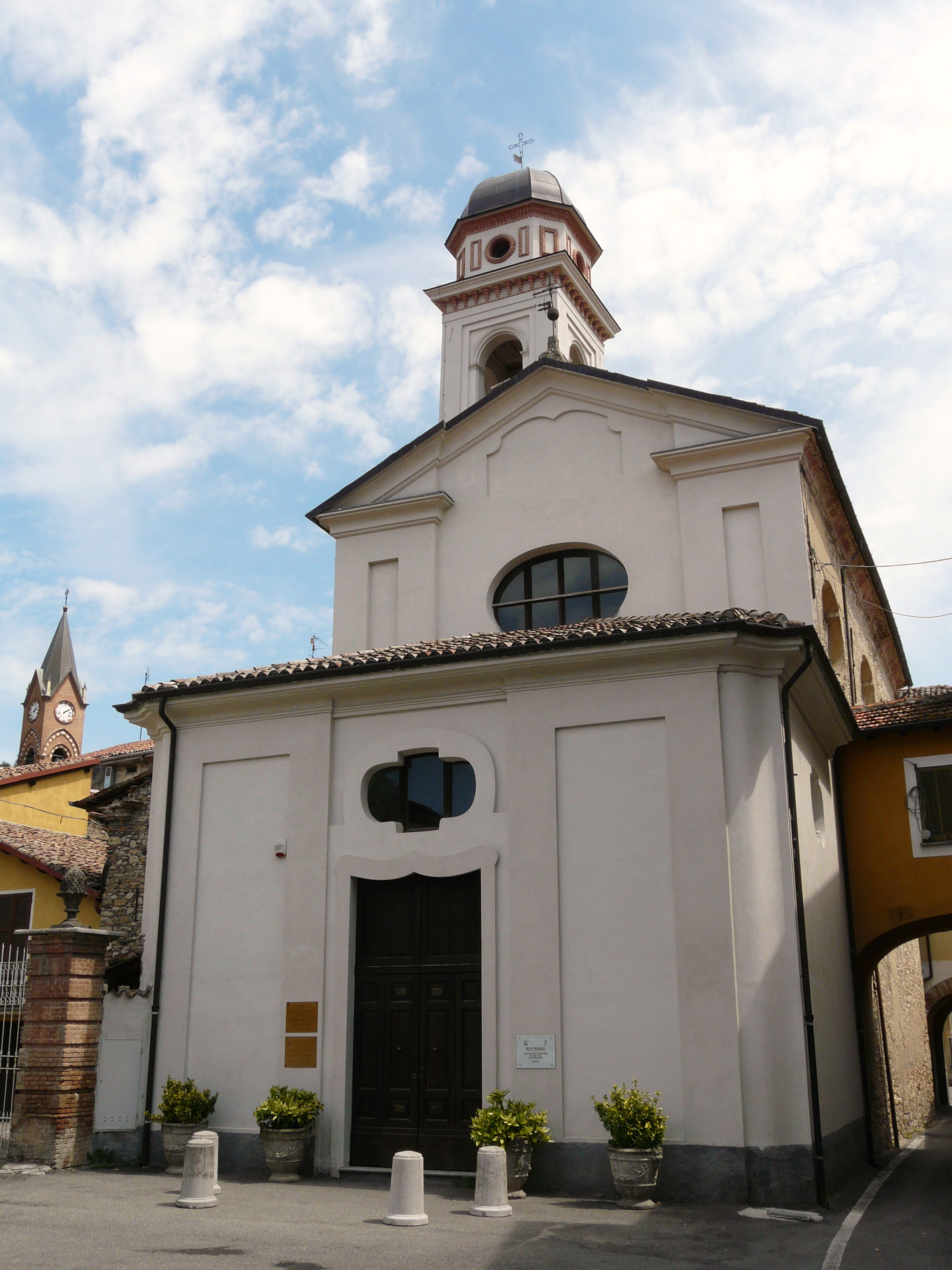 Museo di arte contemporanea, Goadiasco, Lombardia, Italia